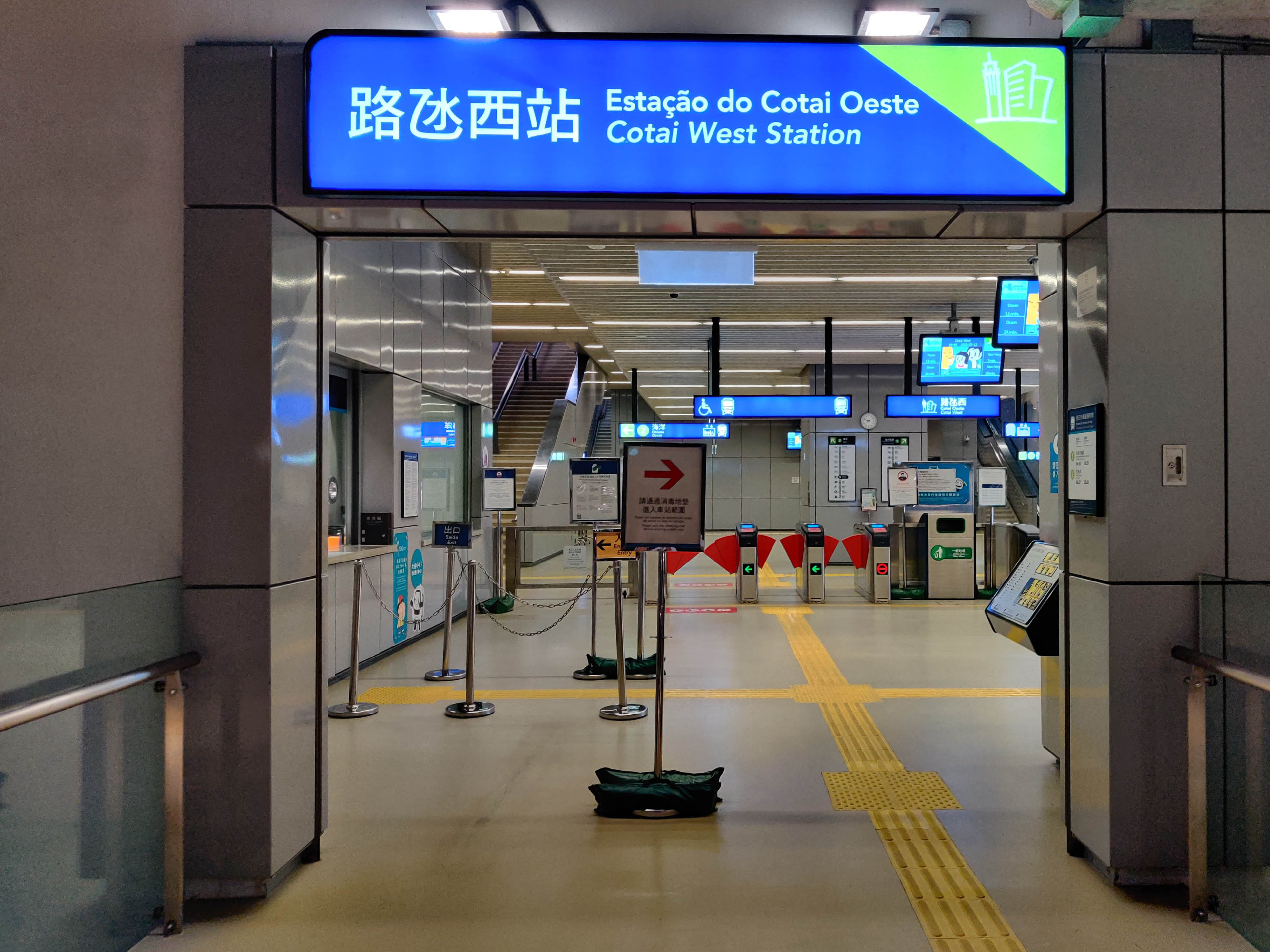 中文（香港）: 澳門輕軌路氹西站大堂入口